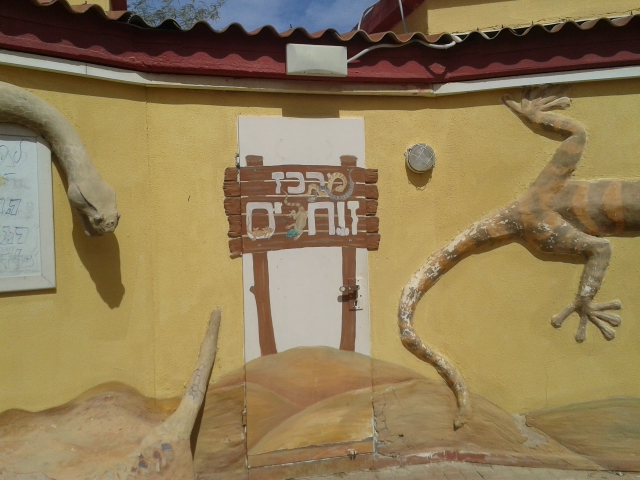 מרכז הזוחלים